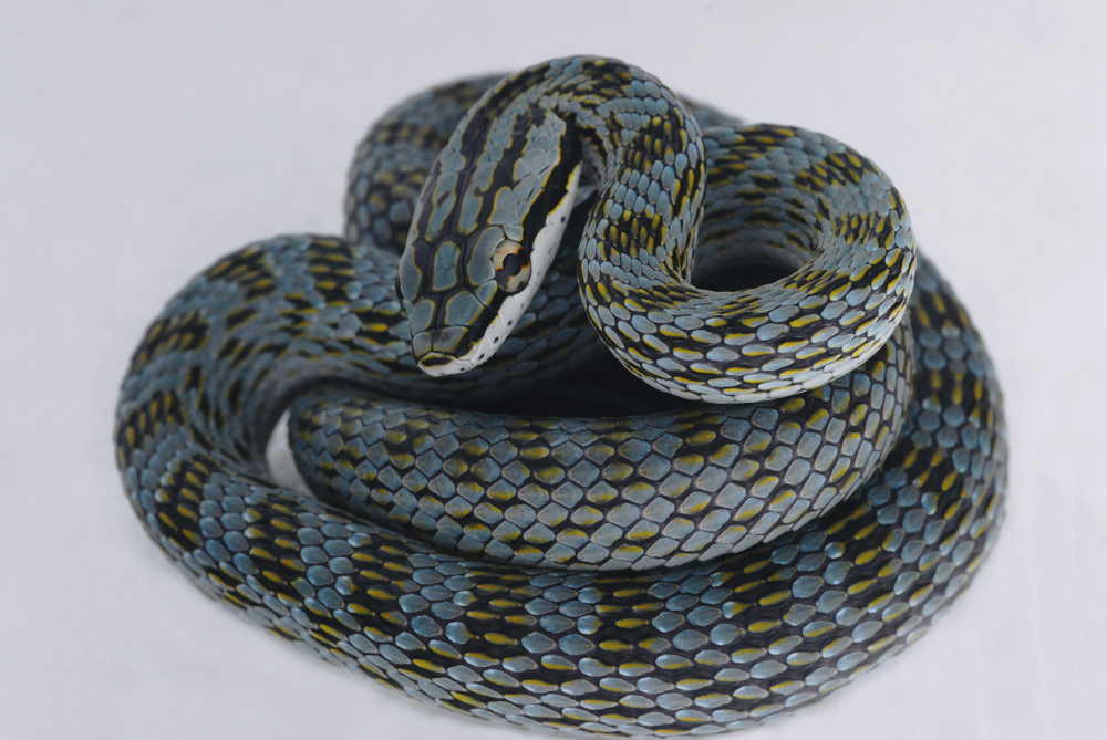 Zügelnatter, Gonyosoma frenatum, Jungtier.